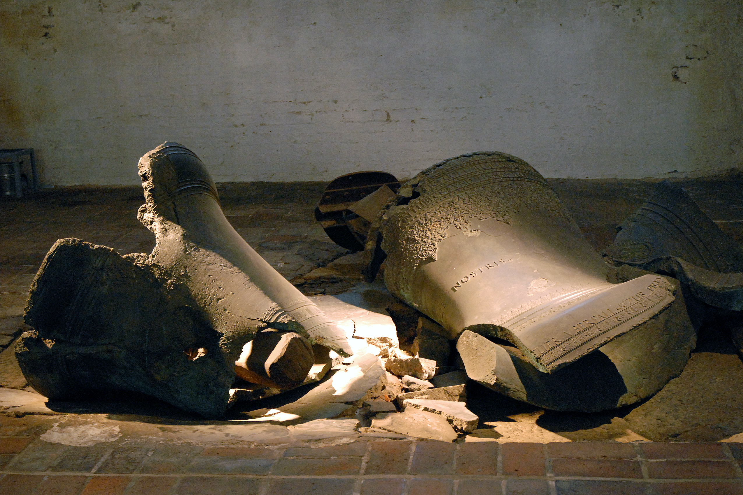 Im 2. Weltkrieg zerstörte Glocken der Kirche St. Marien, Lübeck